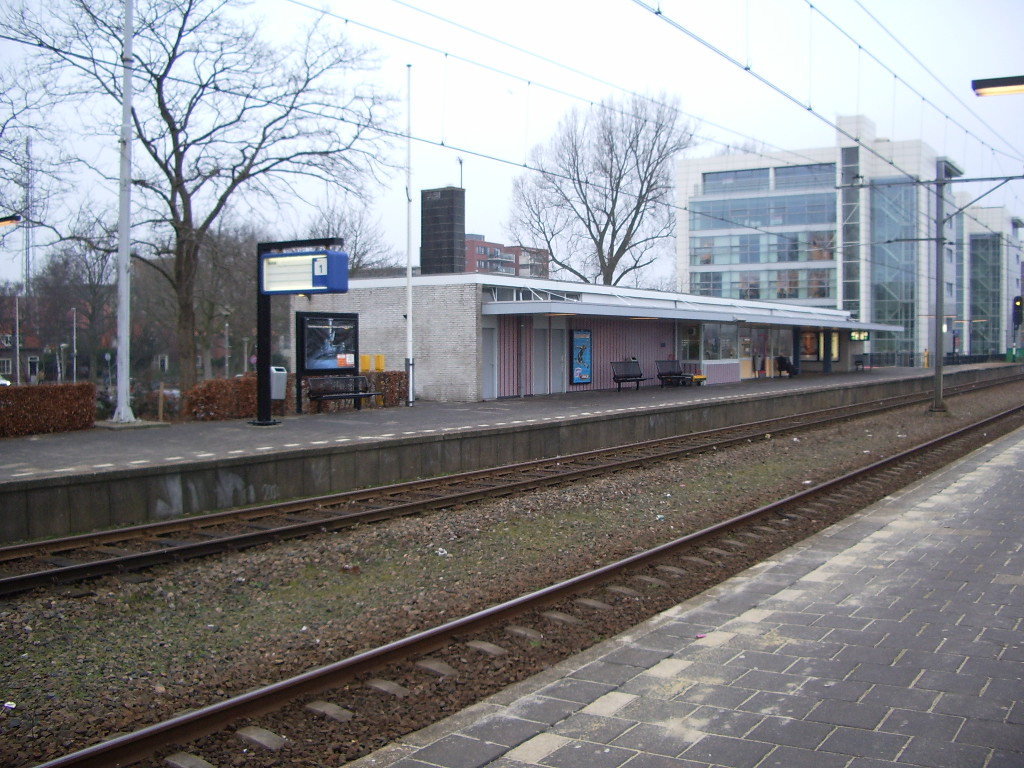 Purmerend